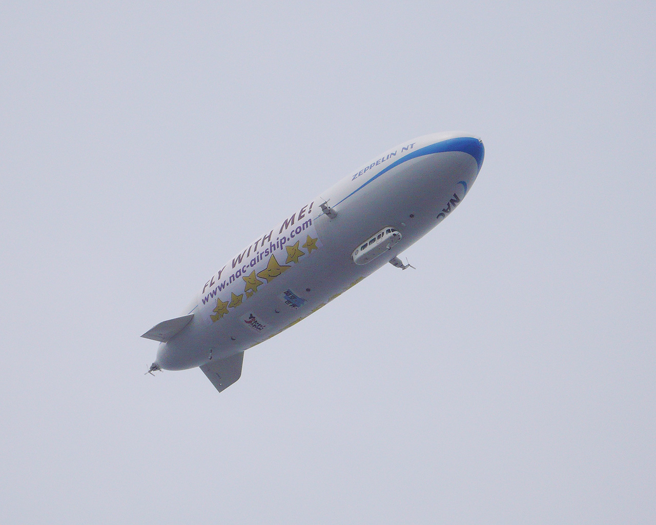 日本飛行船のツェッペリンNT